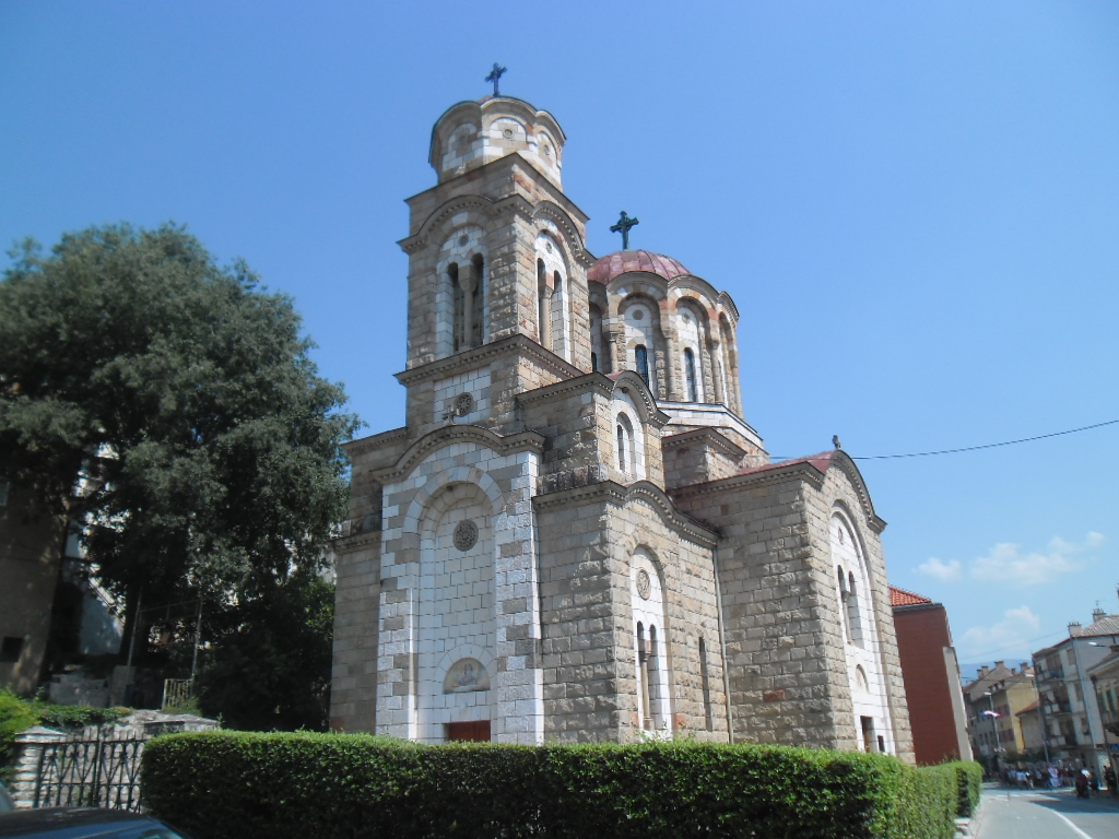 pravoslavna crkva u Kninu